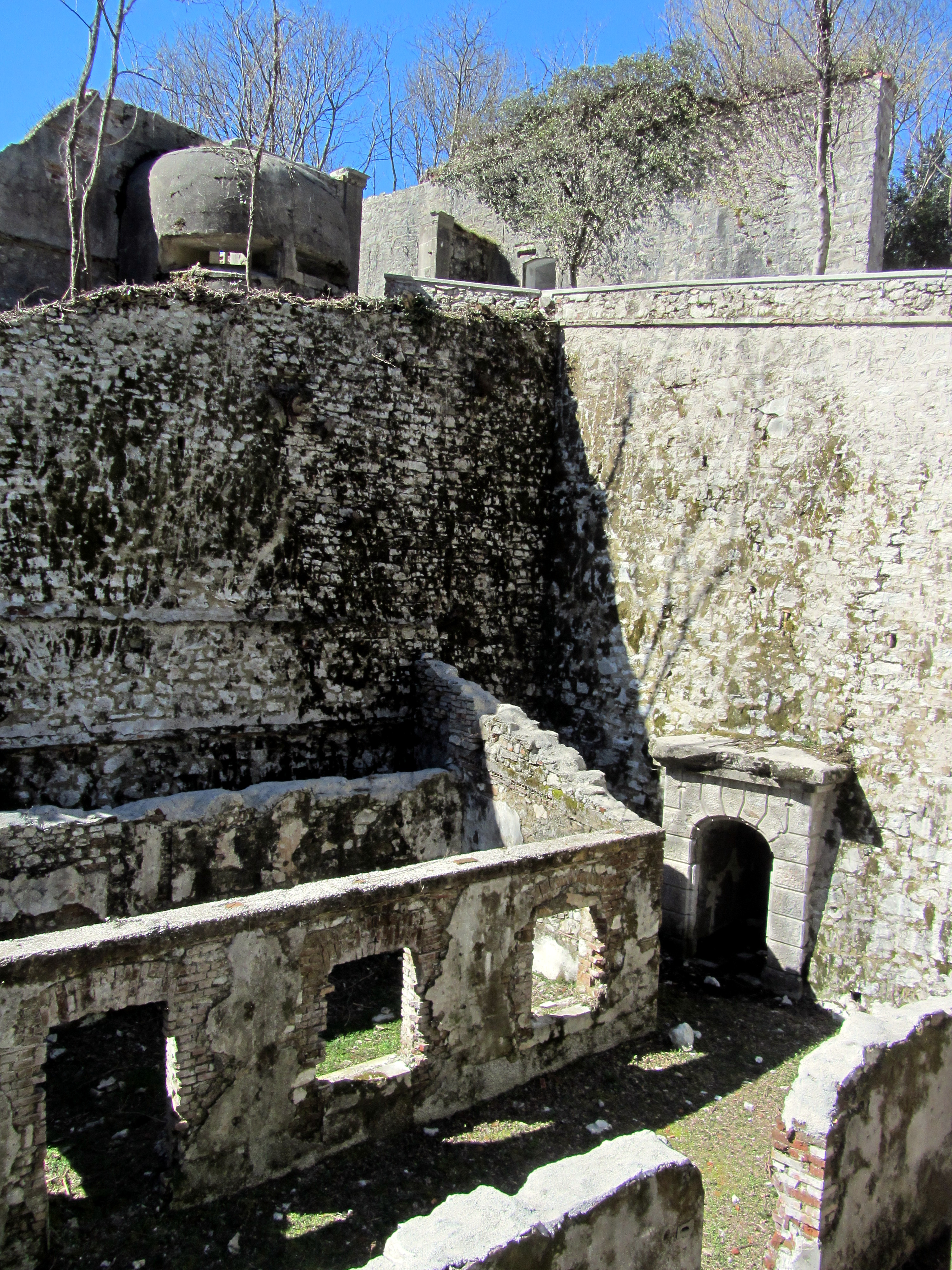 Forte di monte Ercole - Ospedaletto di Gemona (UDINE) - ITALY Postazione mitragliatrice (caponiera) e locali di preparazione munizioni